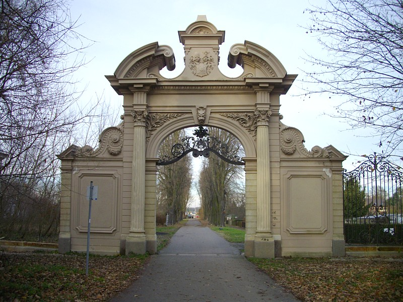 Das Adlertor am Eingang zum Keesschen Park, Markkleeberg